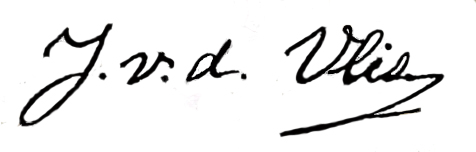 Ko van der Vlis signature.